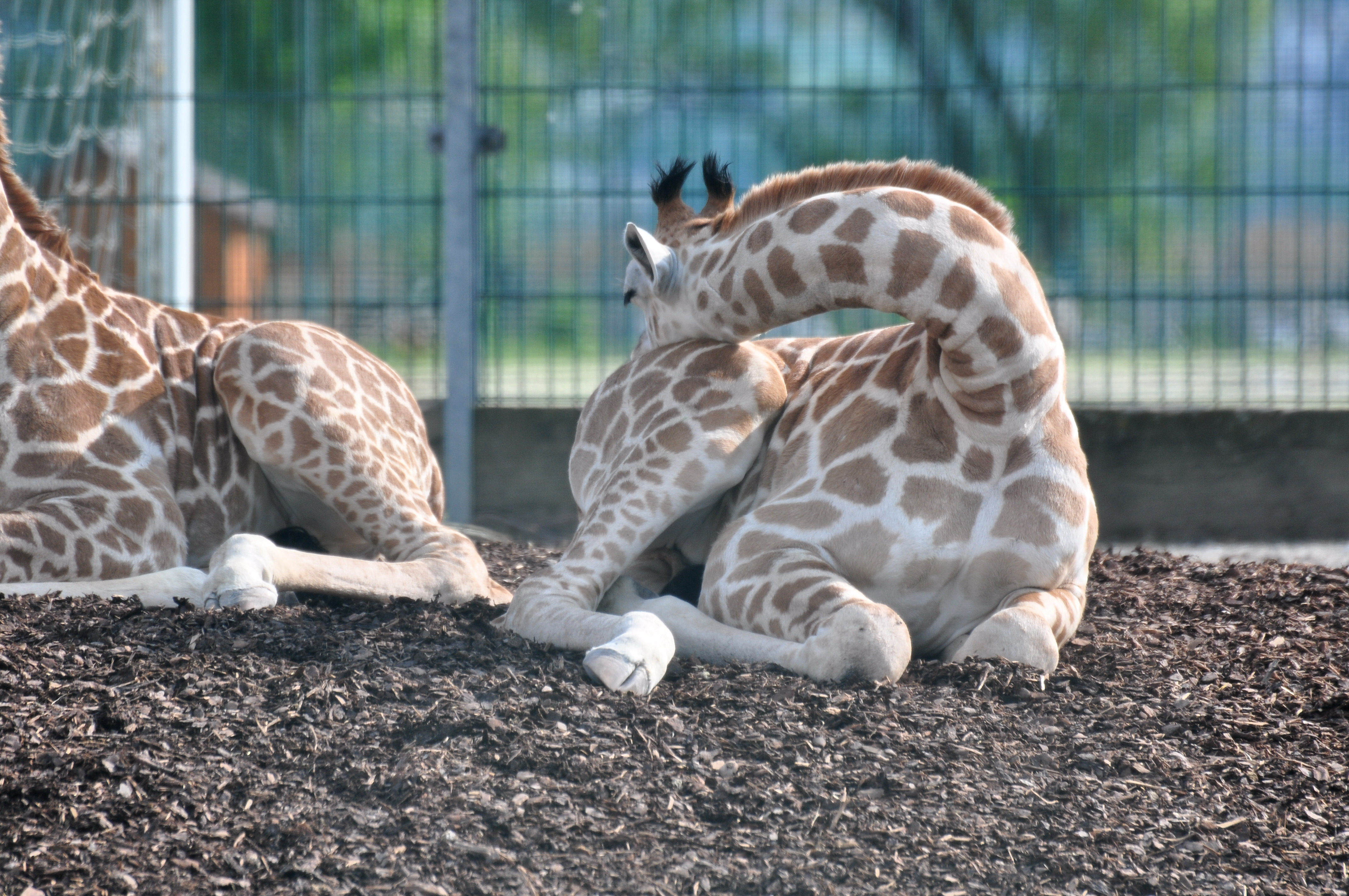 Giraffa camelopardalis, Knie's Kinderzoo in Rapperswil (Switzerland)13. März 2011 15:30 Uhr: Mara (16 Jahre) gebar nach rund 16 Monaten Tragzeit ihr fünftes Jungtier (männlich).14. März 2011 13:30 Uhr: Luana (16 Jahre) gebar ihr fünftes Jungtier (weiblich).Der Kinderzirkus durfte damit die 15. Geburt einer vom Aussterben bedrohten Giraffen-Unterart feiern und auf diesem Weg einen wertvollen Beitrag zur Erhaltung der Rothschild-Giraffen leisten. Die Jungtiere werden Namen mit den Anfangsbuchstaben ‹J› erhalten.